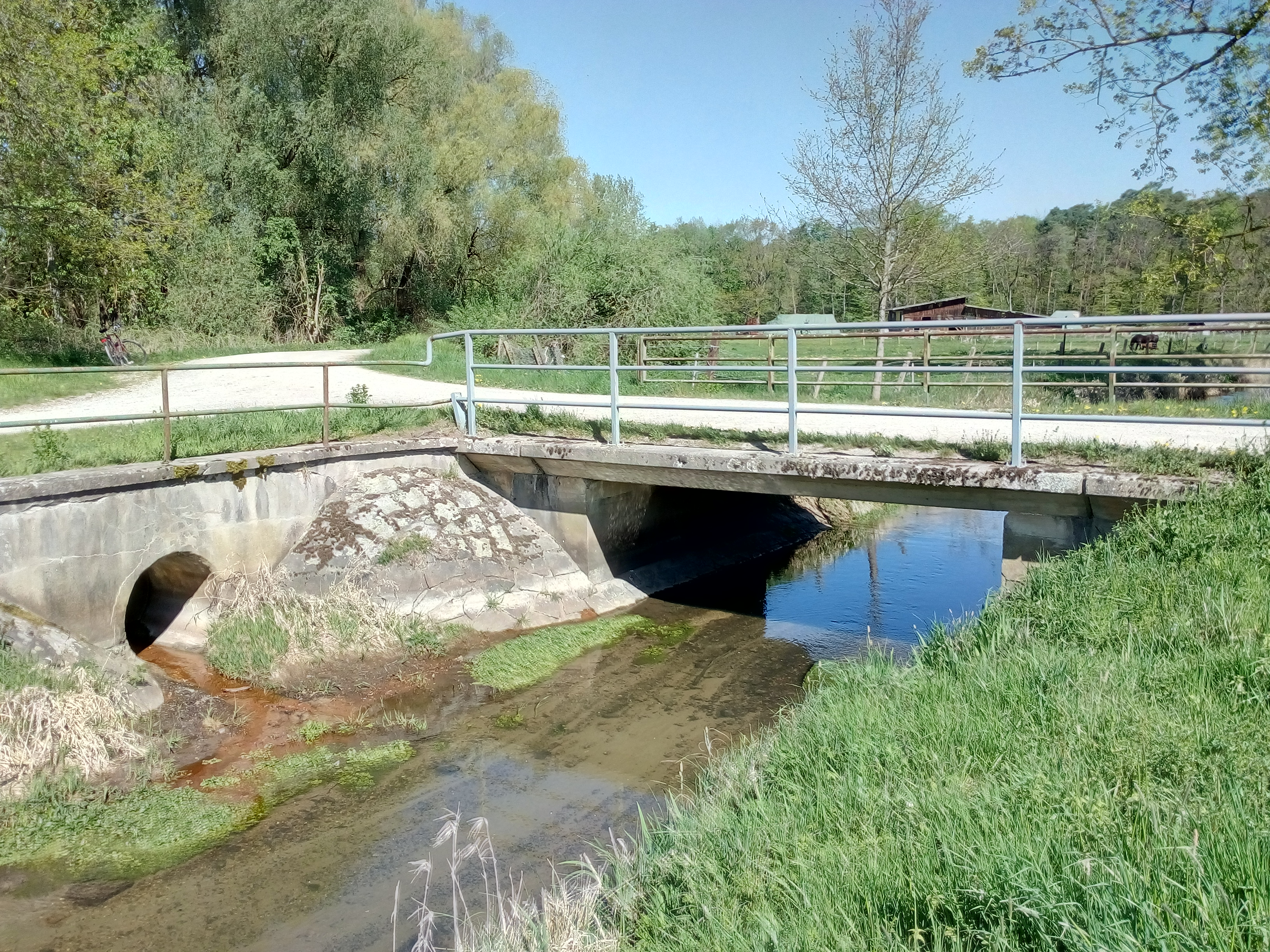 Schinlingraben, Brücke an der Mündung des Bruchgrabens (von links), Gemeinde Hügelsbach